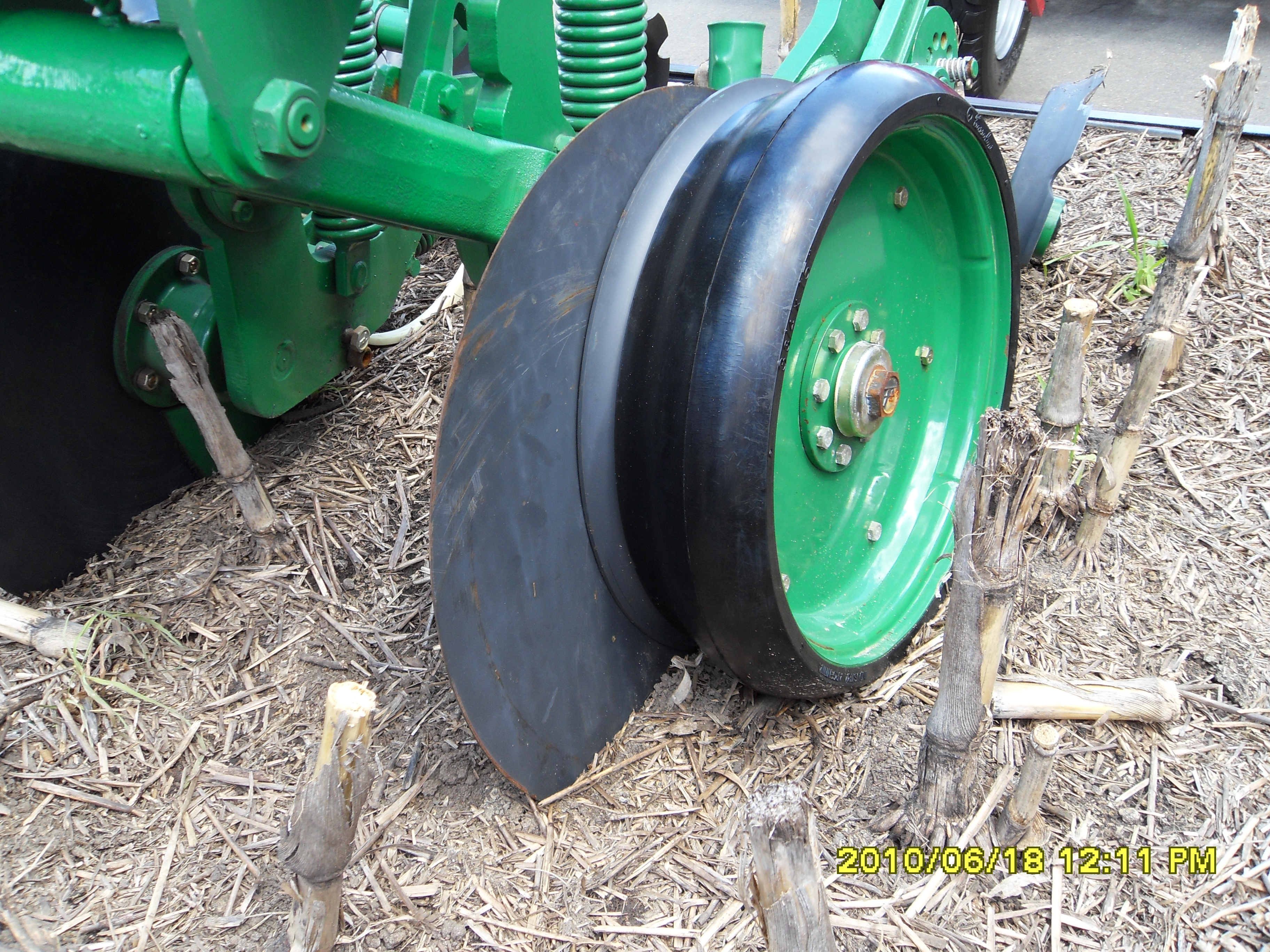 Дисковий сошник з обмеженням глибини